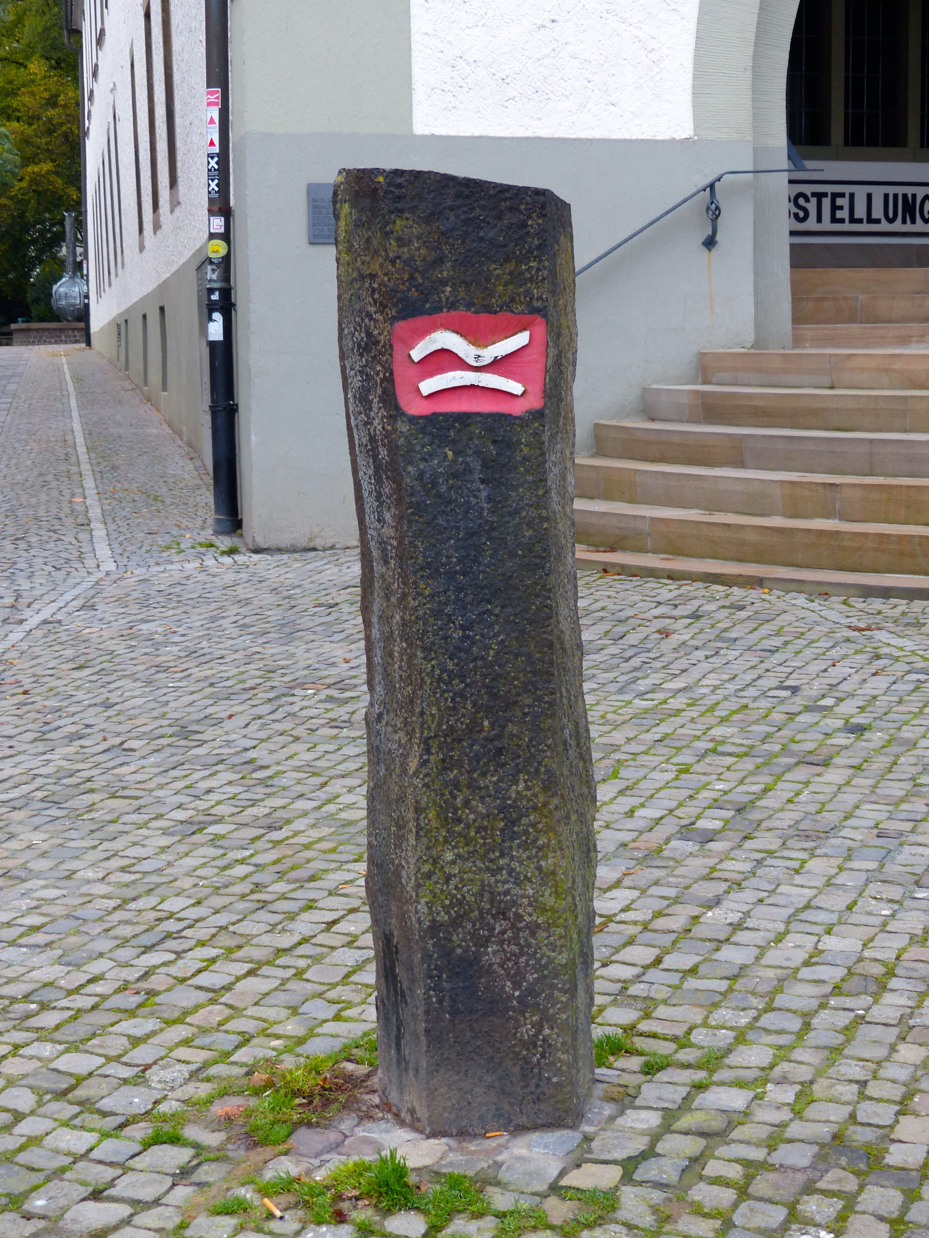 Zeichen des Rothaarsteiges auf dem Marktplatz von Brilon